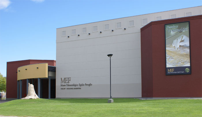 Edificio del Museo Paleontológico Egidio Feruglio